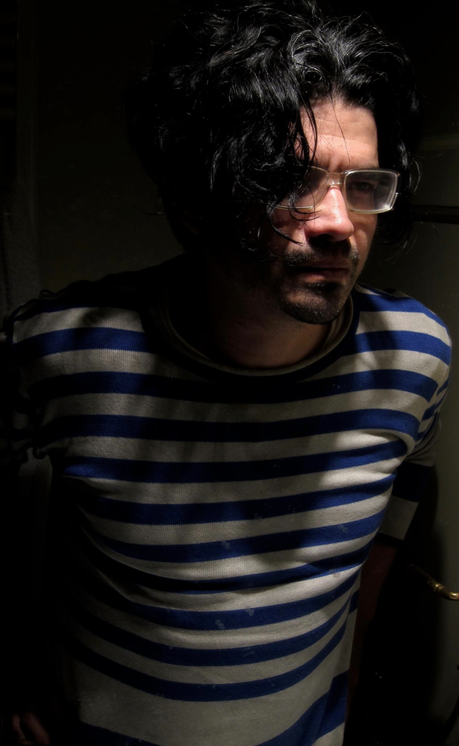 Artista cubano Juan Miguel Pozo.